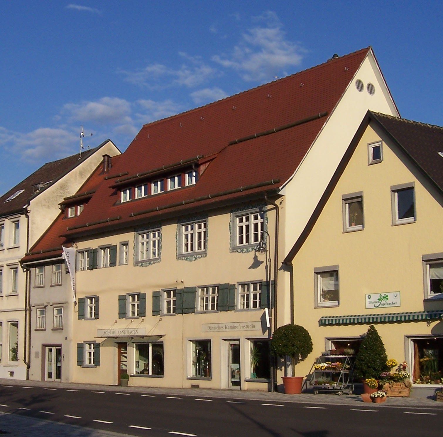 Speidlerhaus in Baienfurt am 26.09.2008